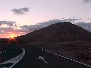 Montaya de Tindaya, Fuerteventura, al atardecer.